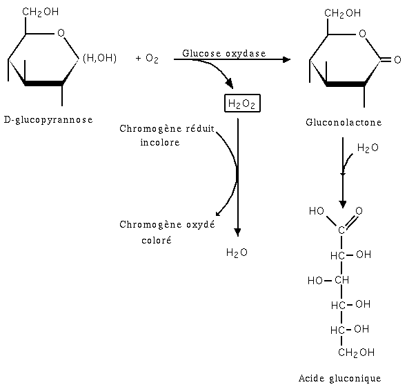 Dosage du glucose par la glucose oxydase. Mars 2005 Création personnelle.